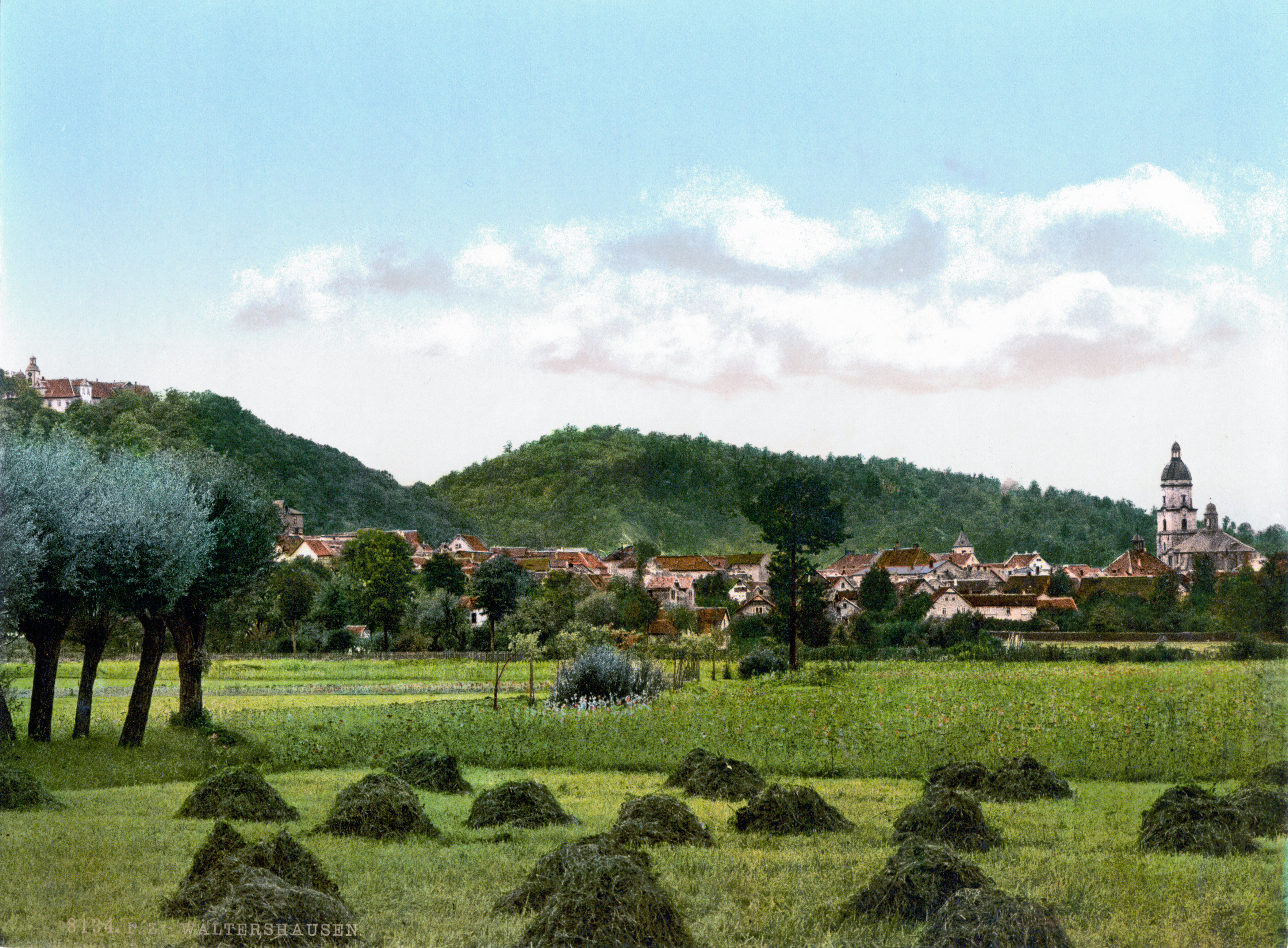 Waltershausen